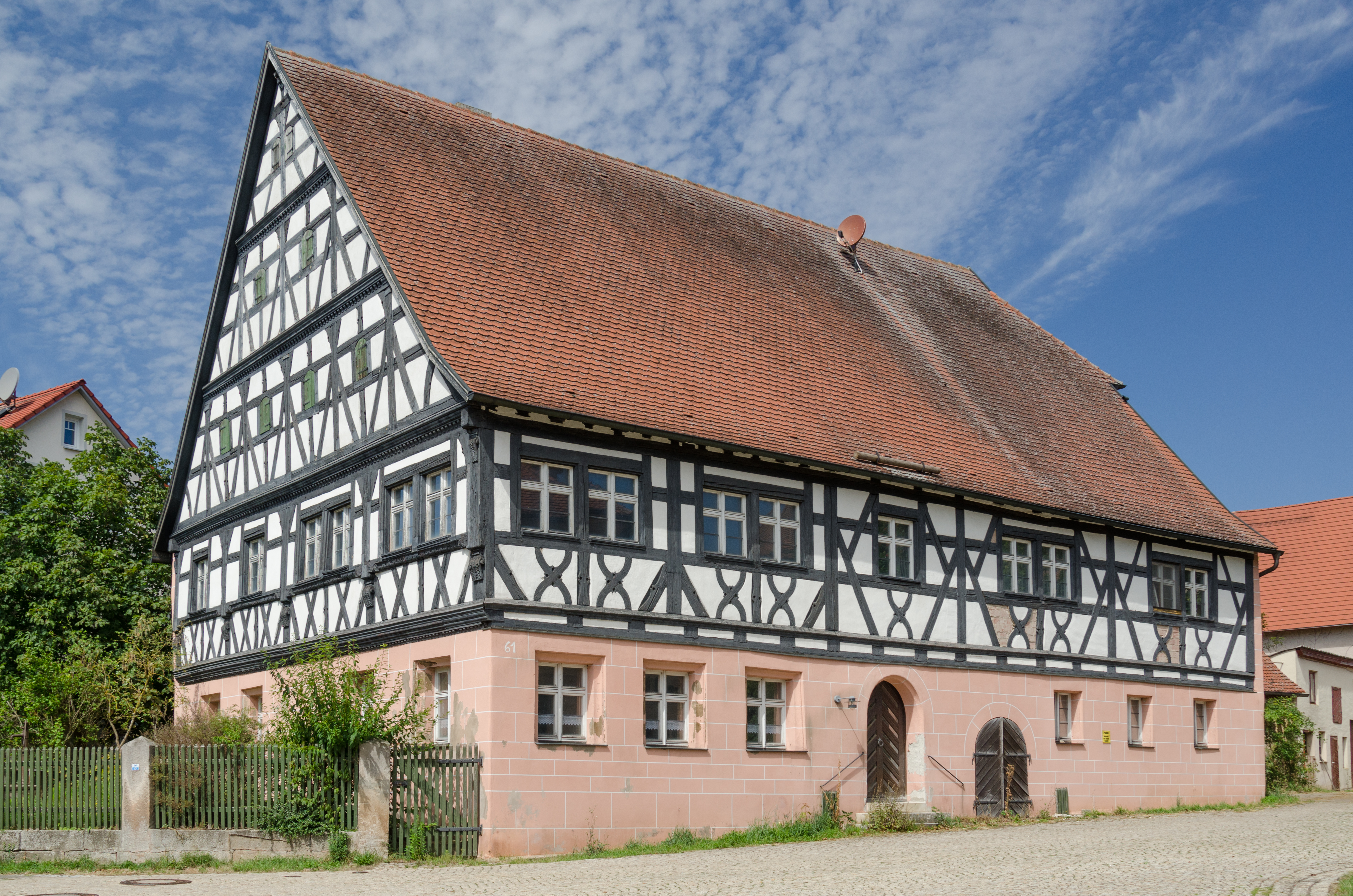 Absberg, Kalbensteinber, Haus Nr. 61